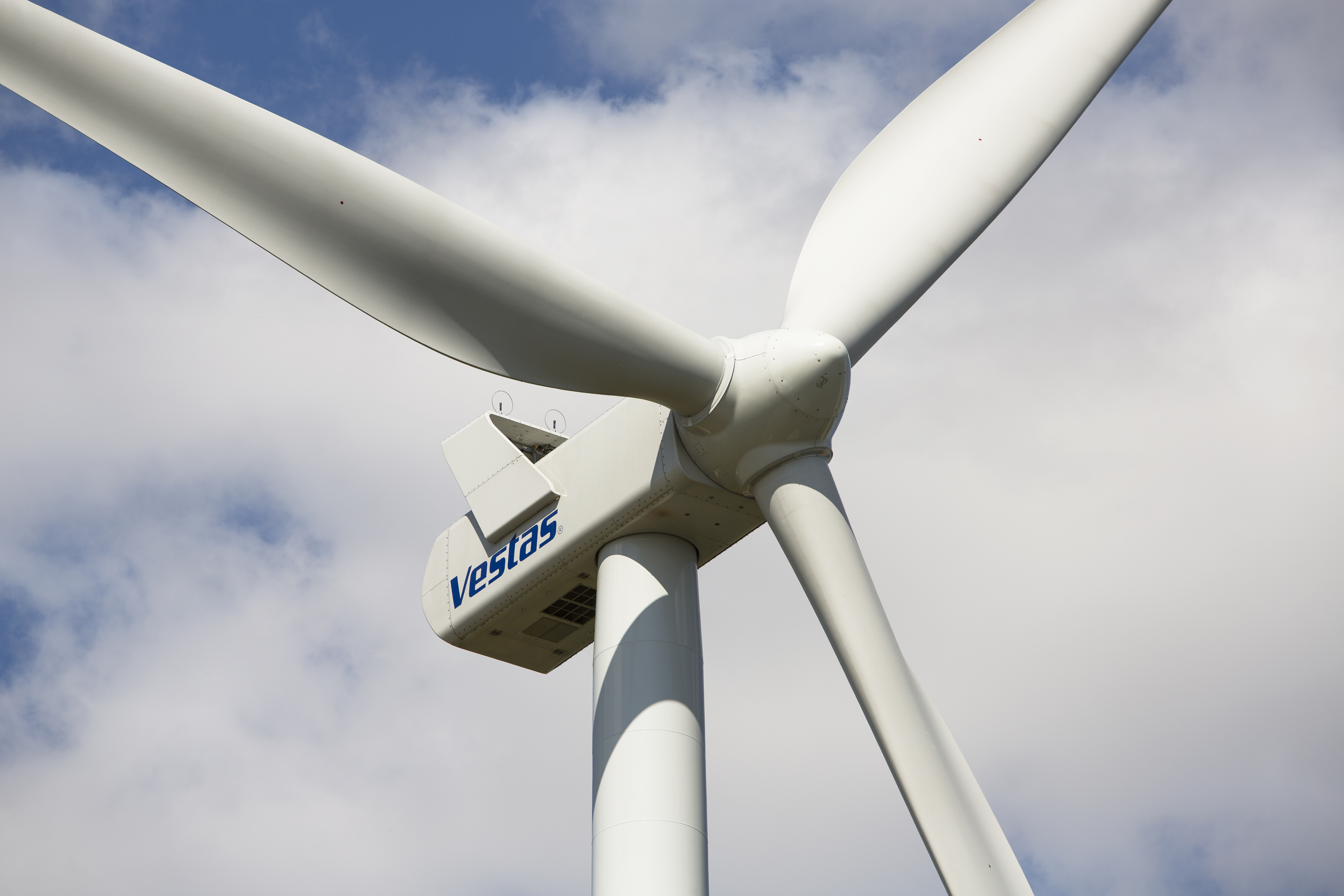 EONs vindkraftpark vid Skabersjö/Törringe utanför Svedala i Skåne fotograferad 2012-08-15. De fem nya vindkraftverken på godset Skabersjös marker har en sammanlagd effekt på 10 MW förnybar el. Vilket motsvarar hushållsel till cirka 5 000 villor. Den totala investeringen ligger på omkring 150 miljoner kronor. De fem turbinerna är av modell V 90 från Vestas. Foto: News Øresund – Johan Wessman. © News Øresund. Bilden får fritt publiceras under förutsättning att källa anges. Bilden får ej manipuleras. (The picture can be used freely under the prerequisite that the source is given. Photo manipulation is not allowed.) Originalfil tillhandahålles gratis, kontakta: News Øresund, Malmö, Sweden. News Øresund är en oberoende regional nyhetsbyrå som ingår i projektet Øresund Media Platform som drivs av Øresundsinstituttet i partnerskap med Lunds universitet och Roskilde Universitet och med delfinansiering från EU (Interreg IV A Öresund) och 14 regionala, icke kommersiella aktörer.